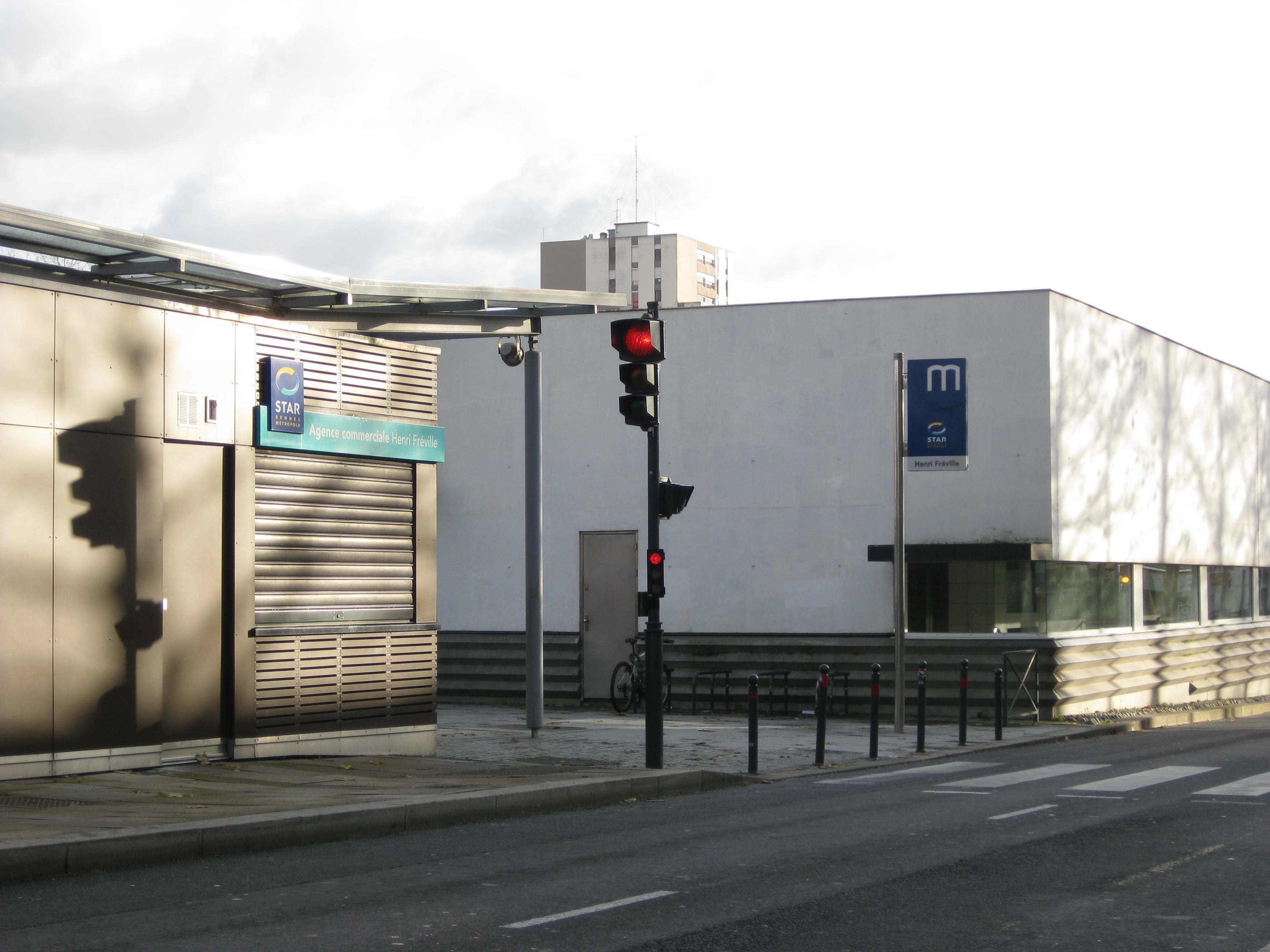 Entrée Station Métro Henri Fréville Rennes